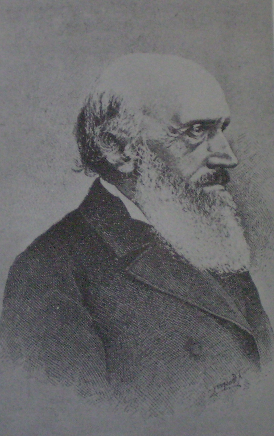 Manuel Ricardo Trelles